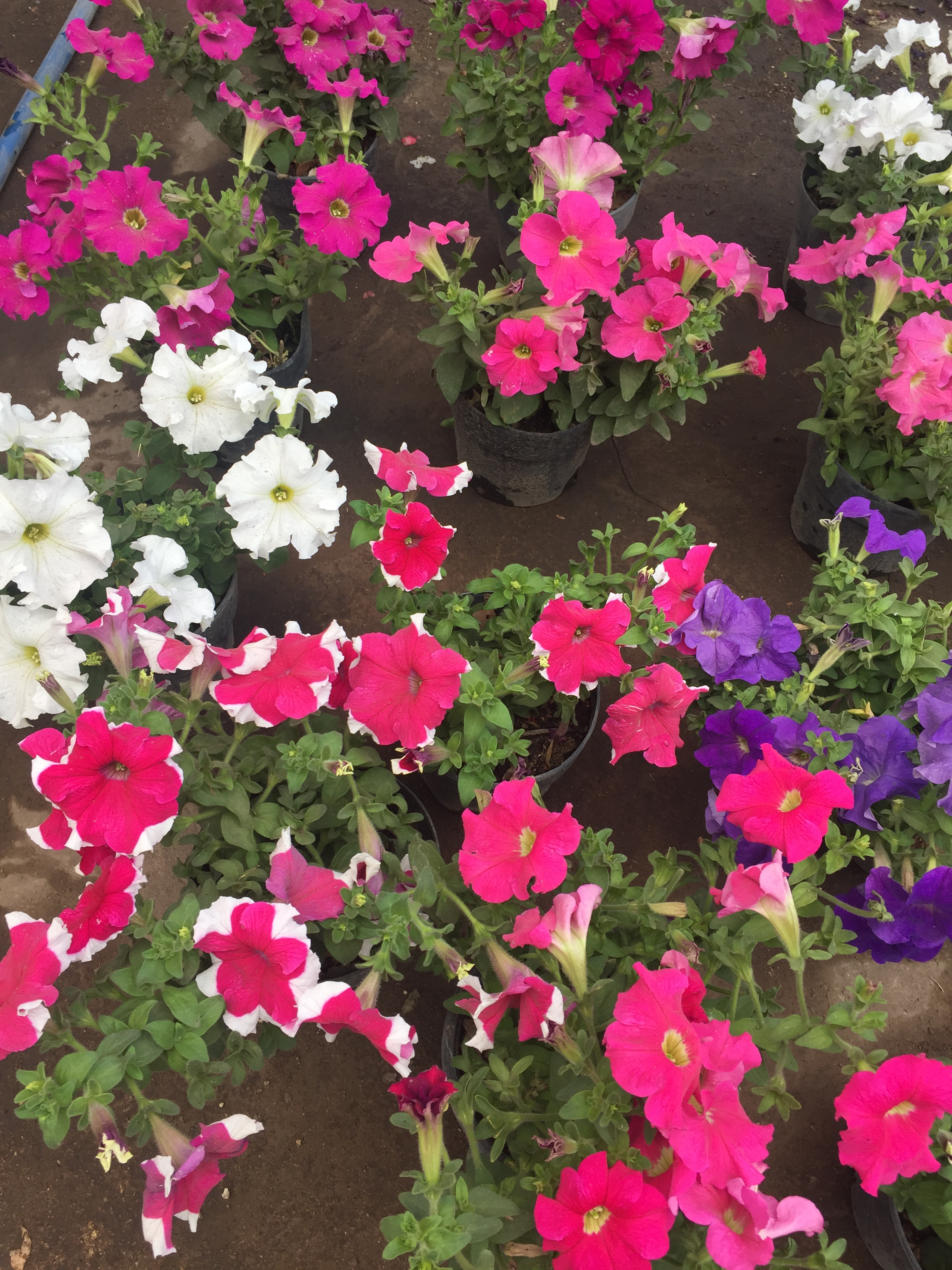 plantas de petunia en macetas